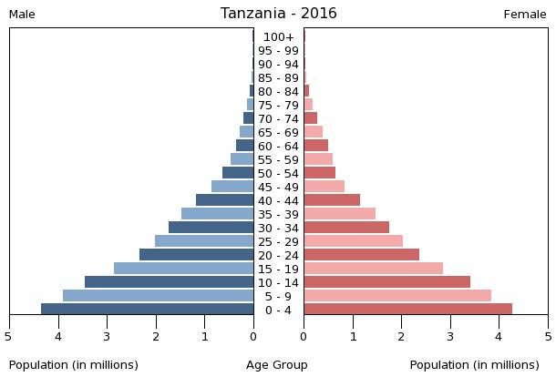 A population pyramid illustrates the age and sex structure of a country's population and may provide insights about political and social stability, as well as economic development. The population is distributed along the horizontal axis, with males shown on the left and females on the right. The male and female populations are broken down into 5-year age groups represented as horizontal bars along the vertical axis, with the youngest age groups at the bottom and the oldest at the top. The shape of the population pyramid gradually evolves over time based on fertility, mortality, and international migration trends.